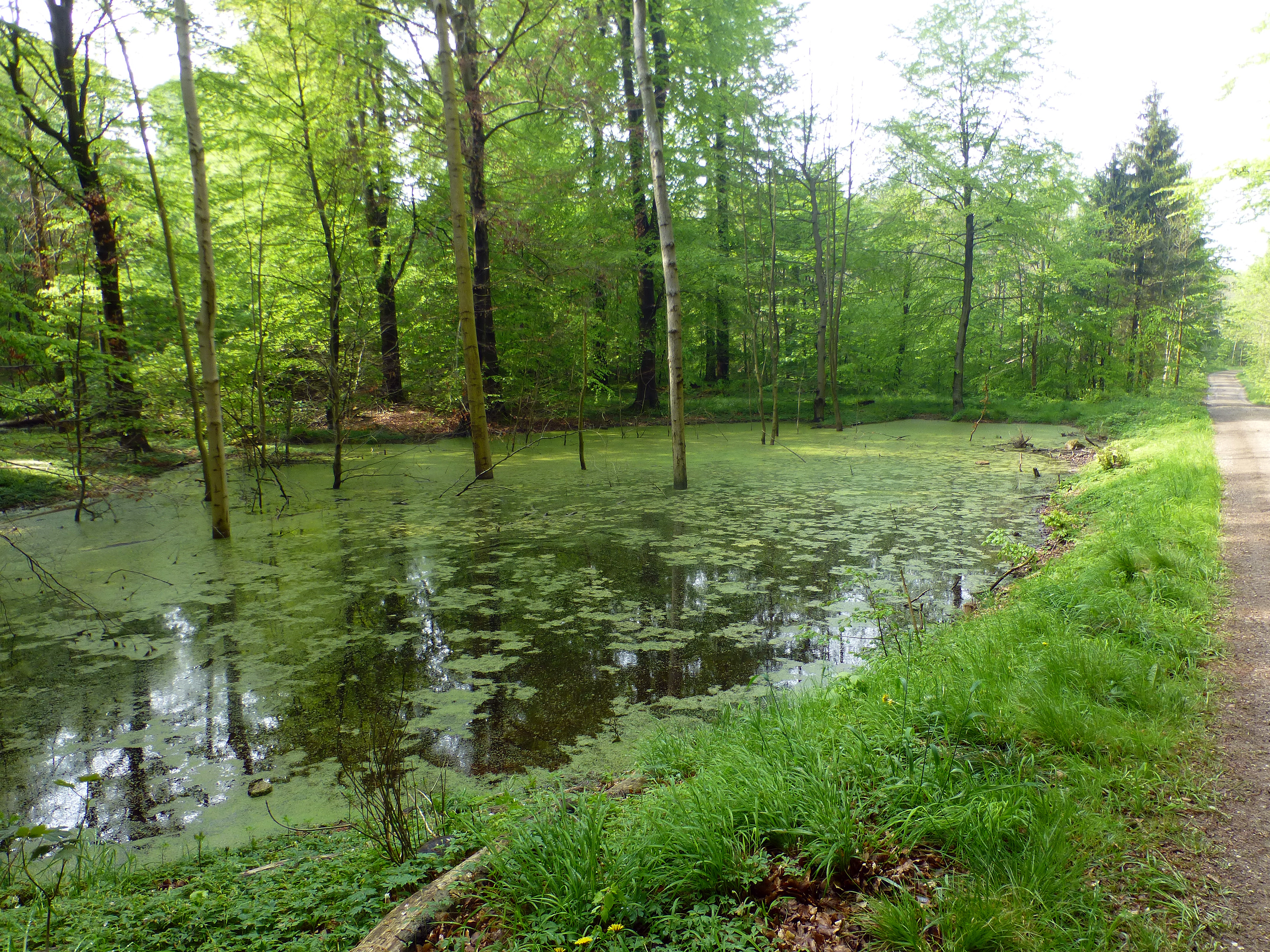 Nydannet dam i skoven